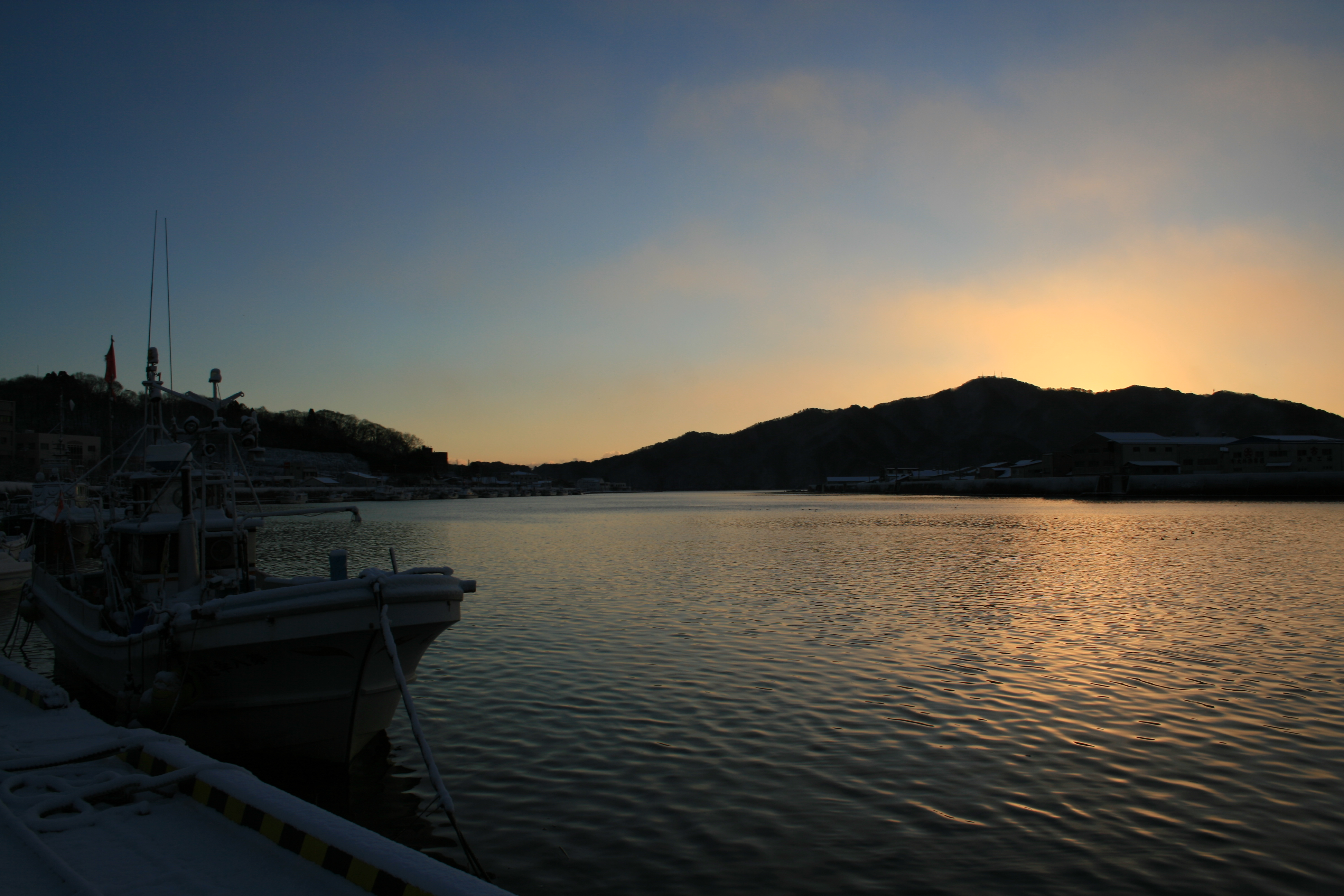 早朝の宮古港